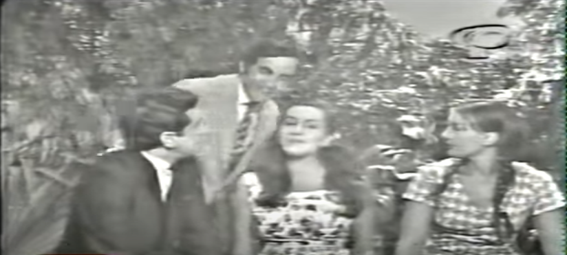 Protagonistas en una escena de la telenovela Simplemente María. Entre ellos, Saby Kamalich, Ricardo Blume y Braulio Castillo. Proviene del especial por los 42 años del canal Panamericana Televisión. La novela termino en 1971.